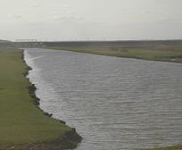 Чичиклія. Річка в Одеській області